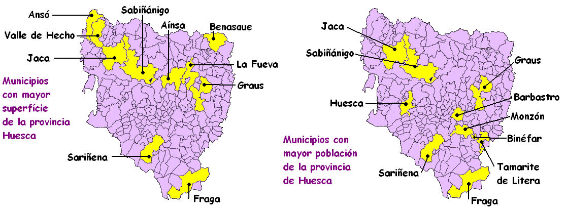 Mapas de municipios de Huesca: más poblados y más extensos.